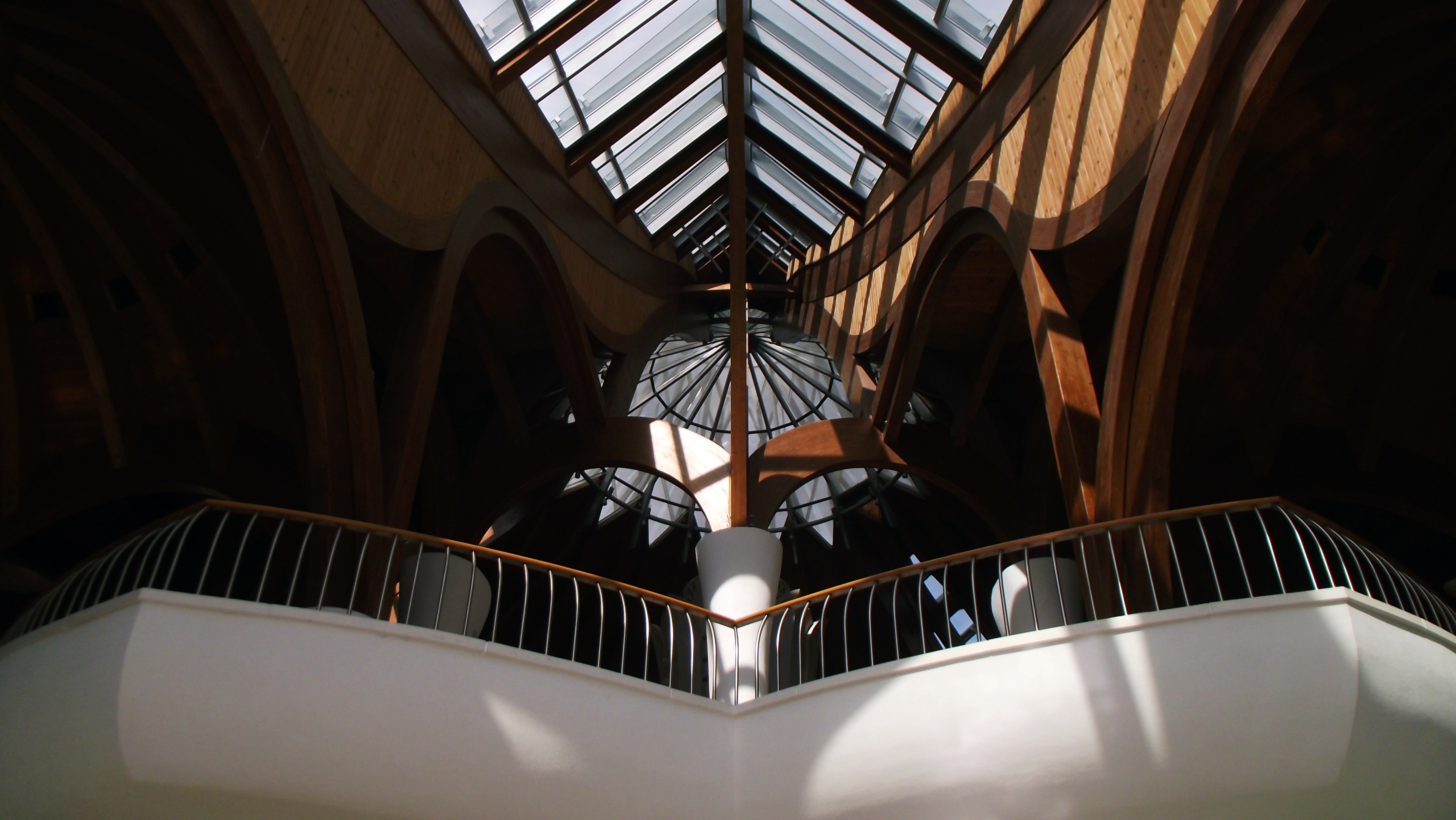 A Makói Hagymatikum 2014 nyarán. Belülről.